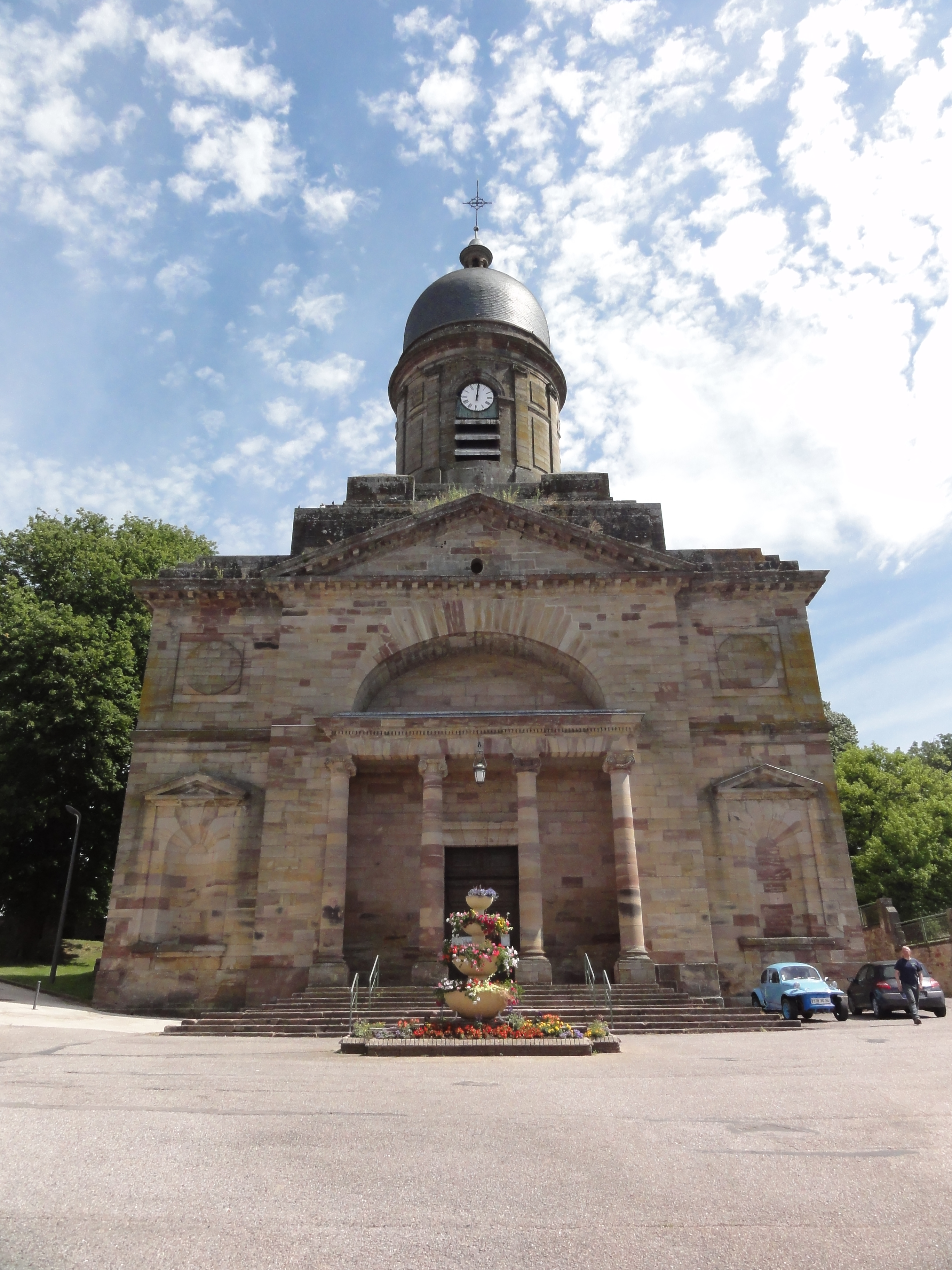 Badonviller (M-et-M) église MH .